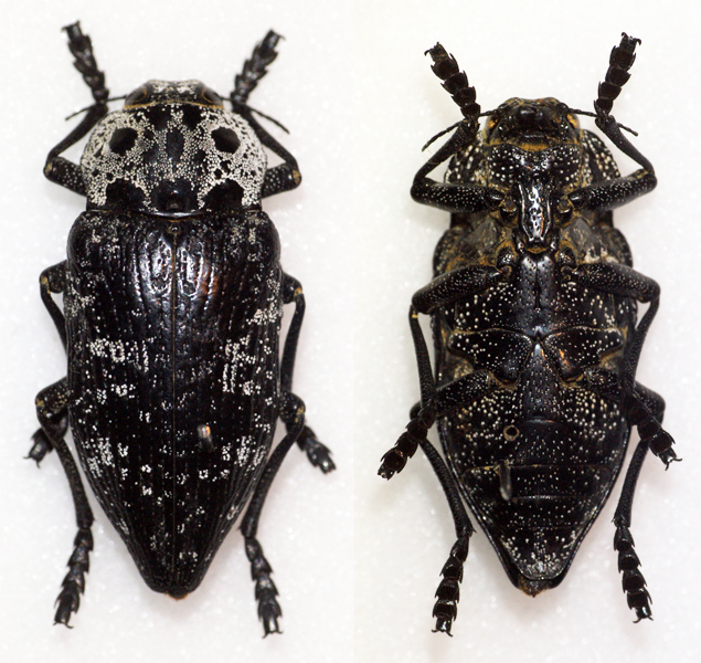 Pallas,1776 Sex: ? Data: 20-06-13 - Varvarovka - Krasnodar - Russia Size: ?